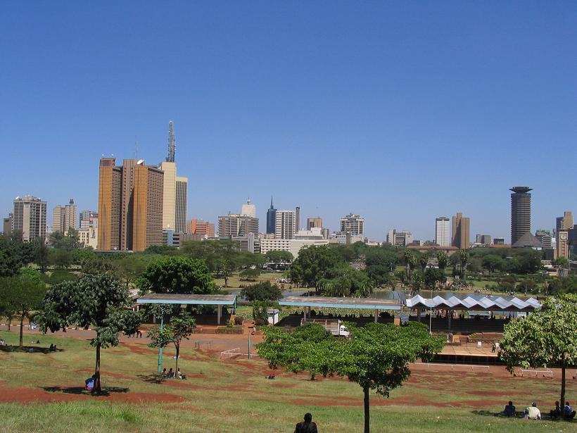 Zicht op centrum Nairobi - Kenia